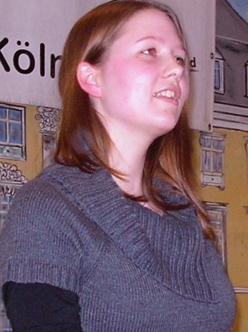 Sarah Hoolt, 2012 in Brühl bei Köln